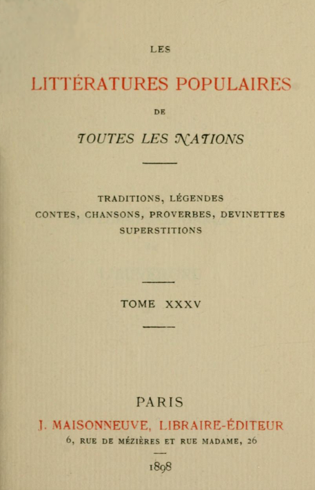 La literatura popular de todas las naciones. París: J. Maisonneve, Libraire Éditeur; 1898.